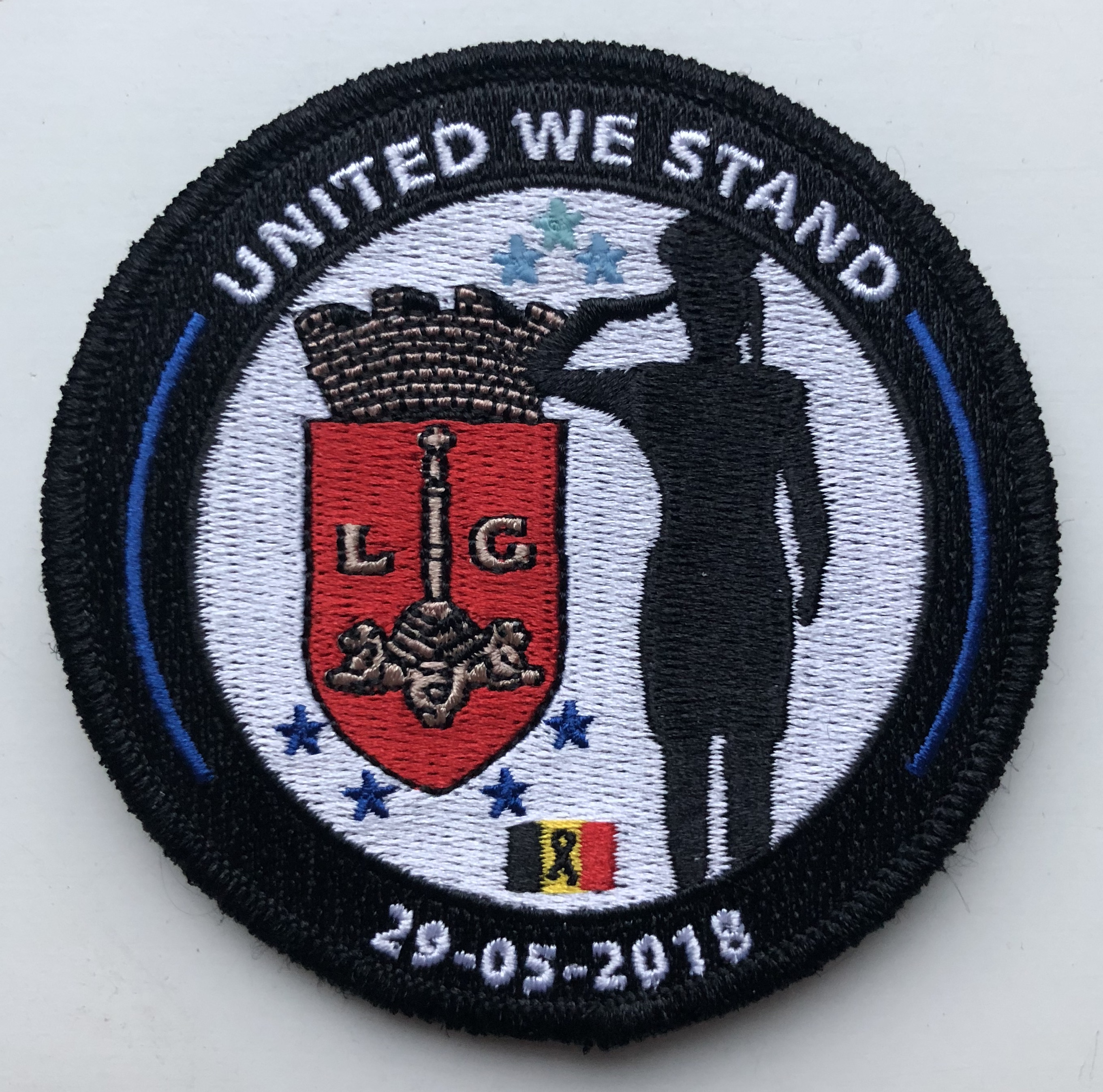 Ecusson de la Belgian Blue Line en hommage aux victimes policières (Soraya Belkacemi et Lucile Garcia) de l'attentat islamiste de Liège du 29 mai 2018